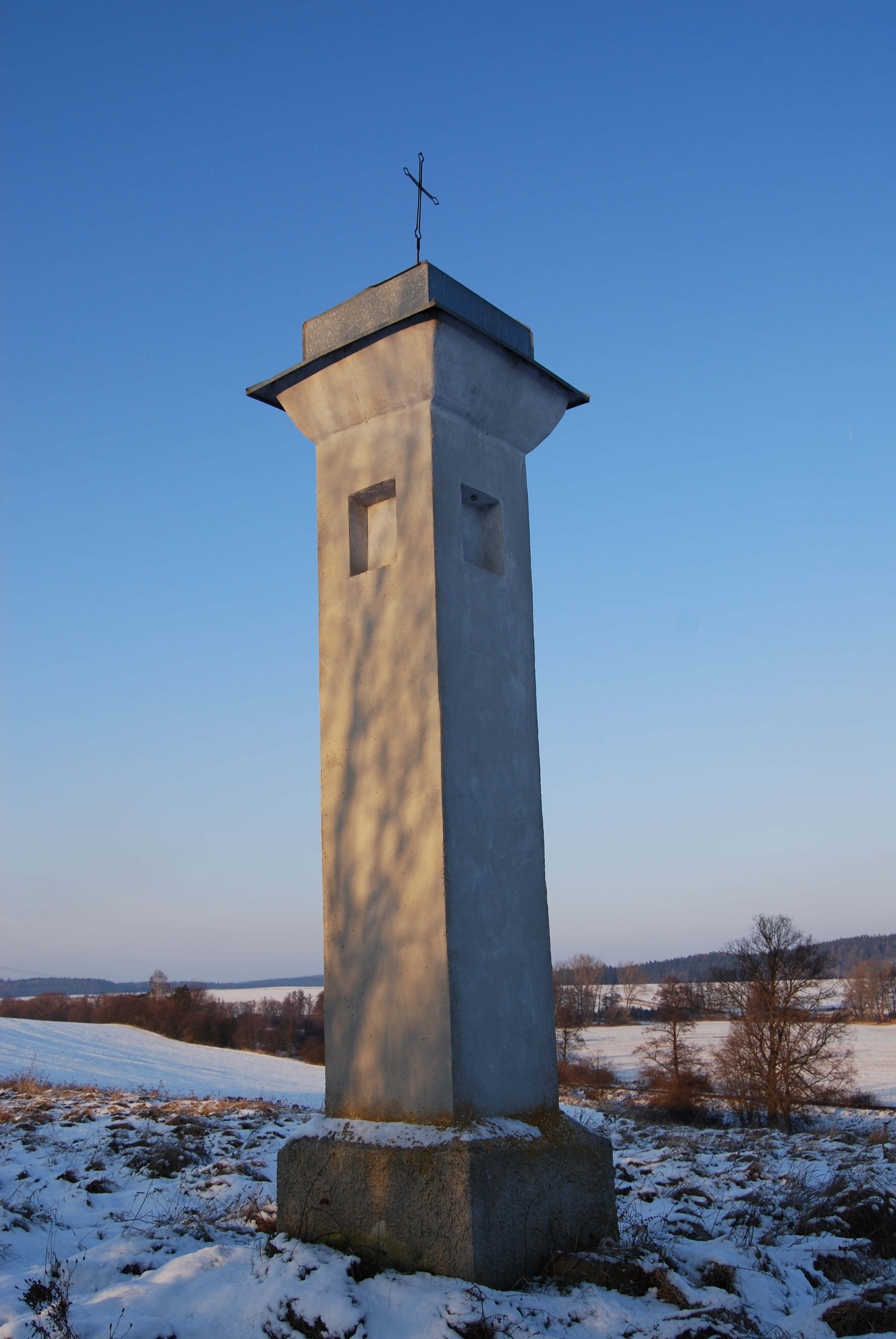 Zděná boží muka za tvrzí poblíž polní cesty severozápadním směrem. Myslín. Okres Písek. Česká republika.